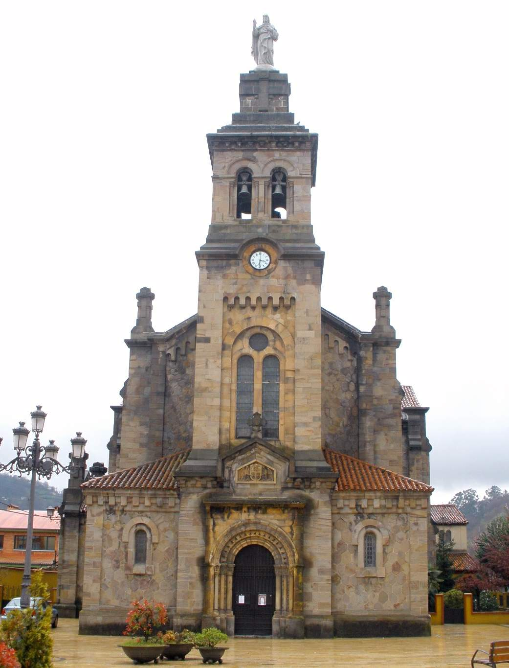 Ciaño (Langreo) - Iglesia de San Esteban